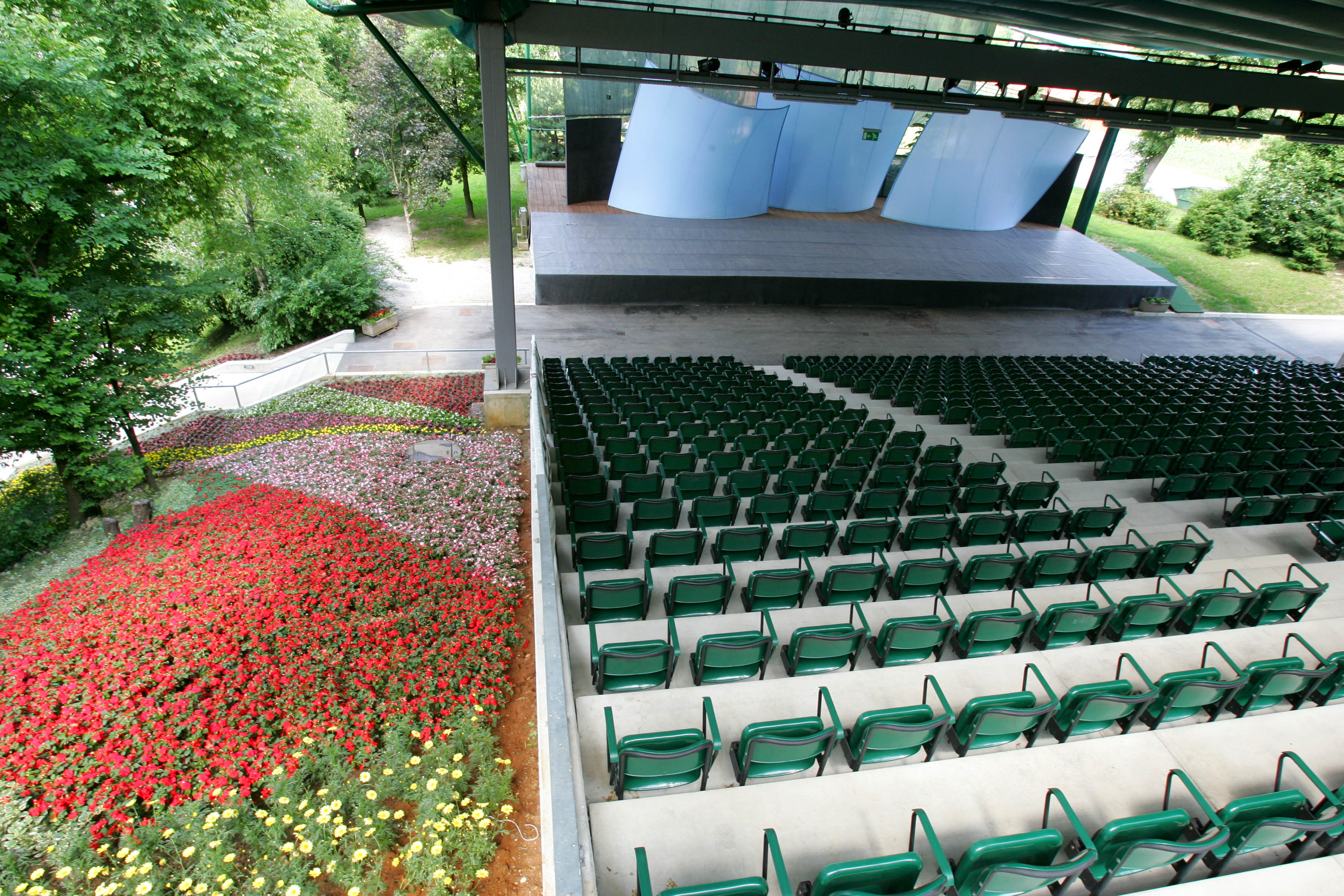 Foto: Uroš Zagožen